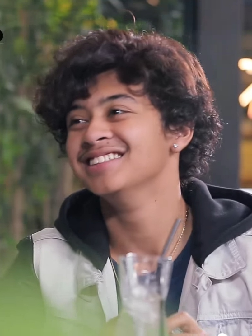 Bastian Steel di acara Lintas Imaji NET. TV pada tahun 2017. Photo adalah hasil tangkapan layar dari video yang diunggah oleh Netmediatama dengan judul "Lintas Imaji - Bereksperimen Tentang Hobi nya Bastian Steel, Travelling (2/3)" yang dilisensikan Lisensi Atribusi Creative Commons (boleh digunakan kembali).